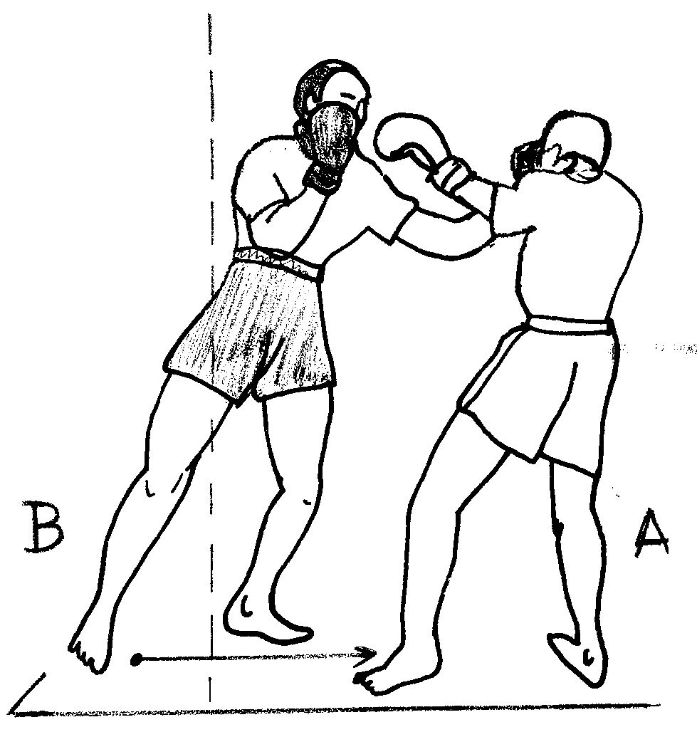 contre_bolo1.jpg